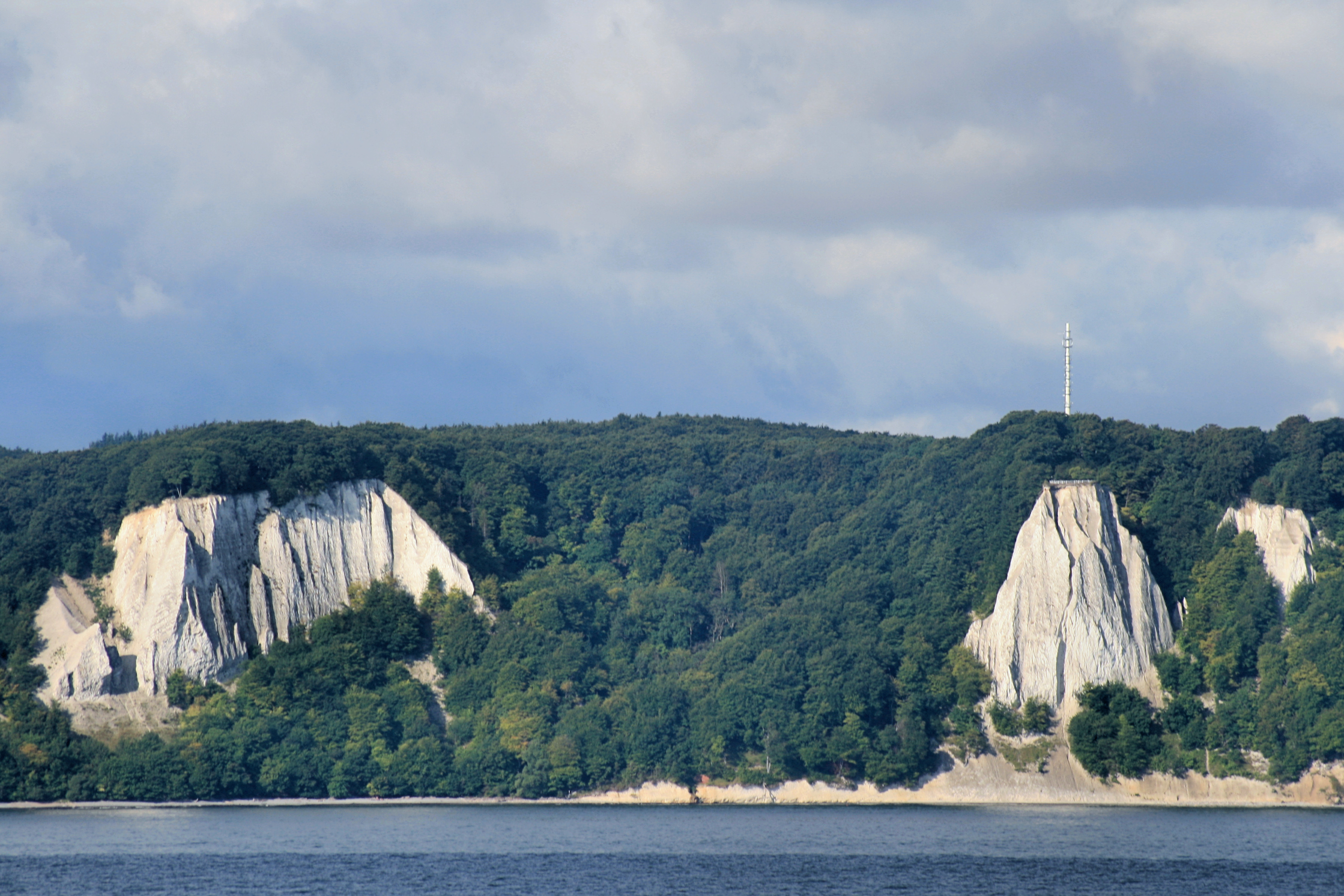 Kreidefelsformation Stubbenkammer im Nationalpark Jasmund auf der Insel Rügen